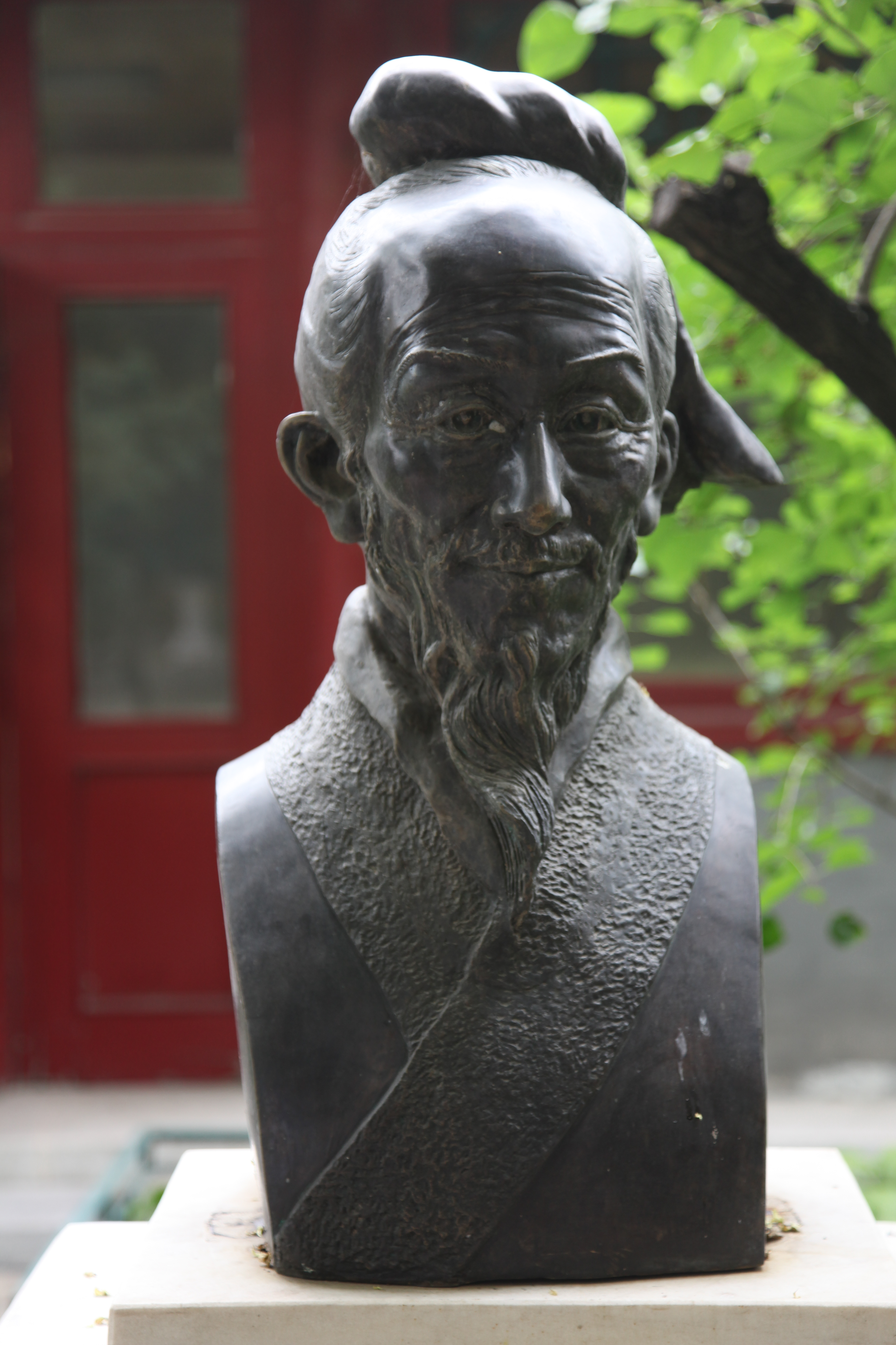 Zu Chongzhi